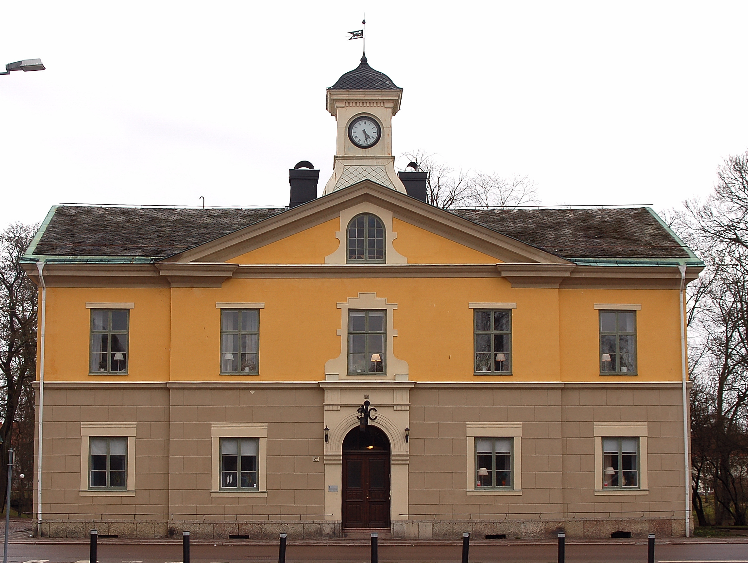 Rådhuset i Kristinehamn